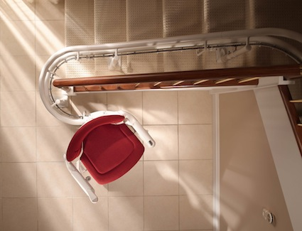 Montascale per rotaie curve